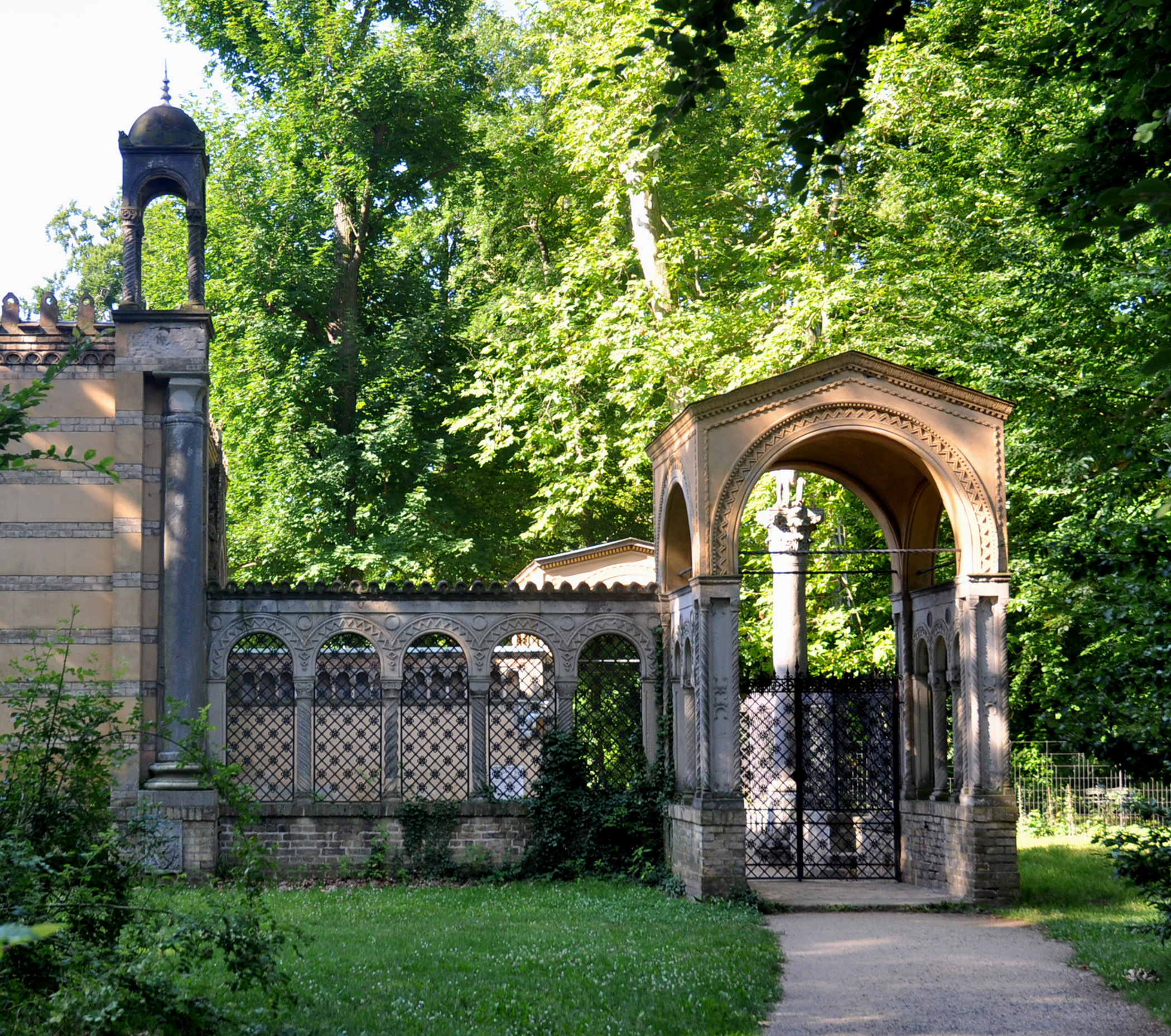 Der Klosterhof von Norden mit dem Parkzugang